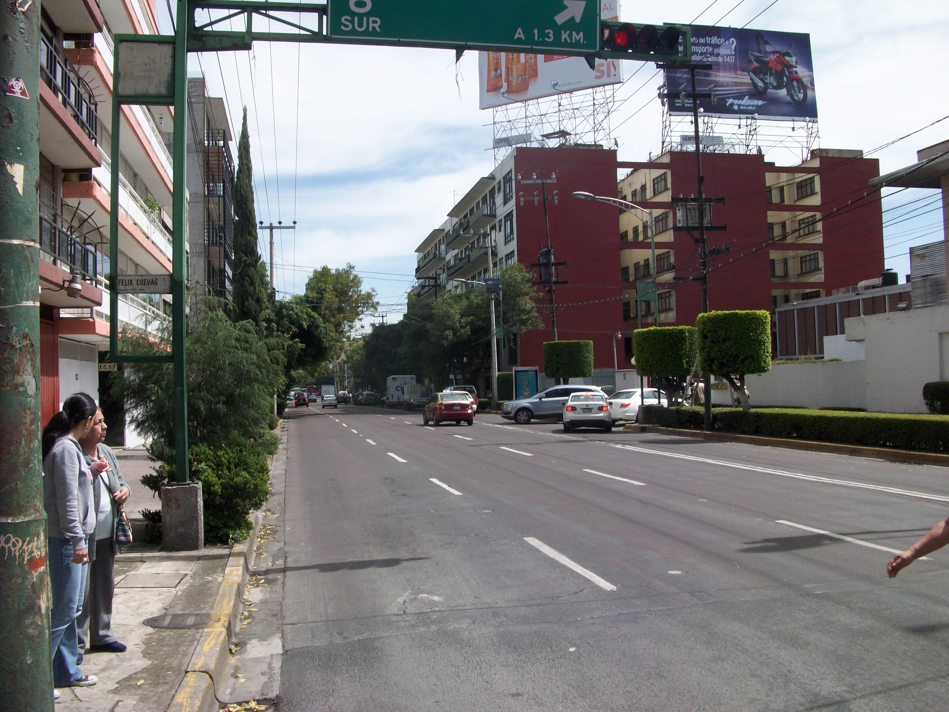 Avenida Gabriel Mancera